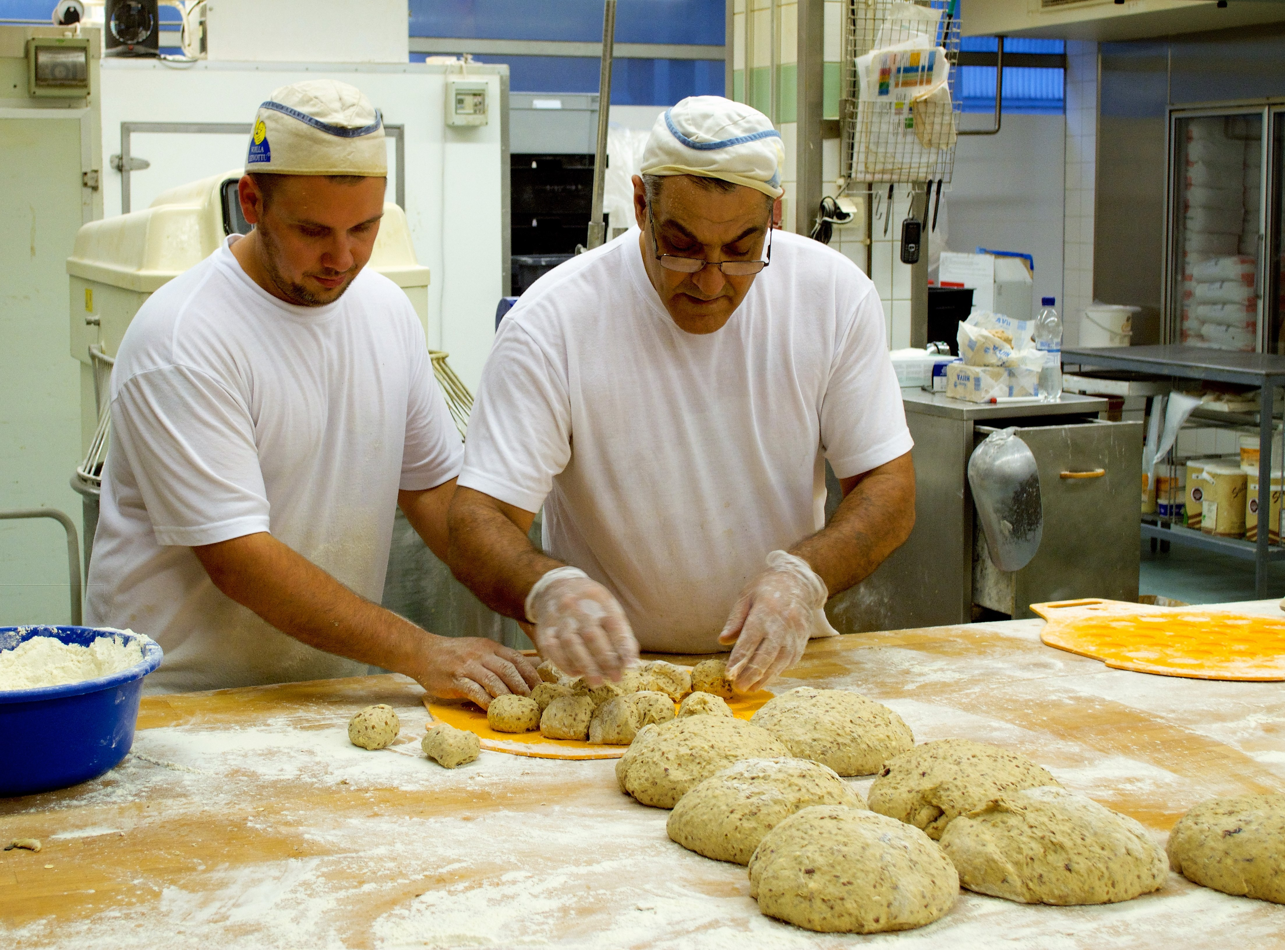 Bäcker bei der Arbeit in einer Bäckerei, hier beim Formen von Teig und bei der Herstellung von Brötchenkränzen